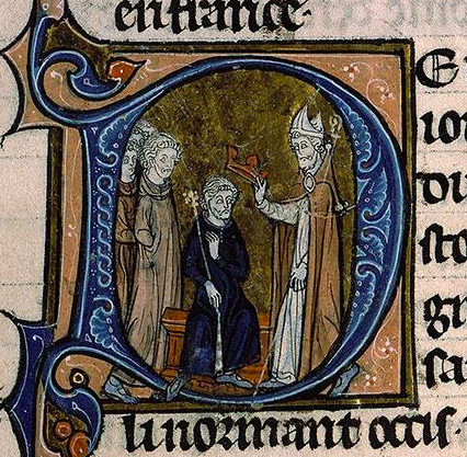 Eudes, fils de Robert Ier le Fort et comte de Paris, fut couronné roi de France en 888 à Saint-Corneille de Compiègne par Gauthier, archevêque de Sens.